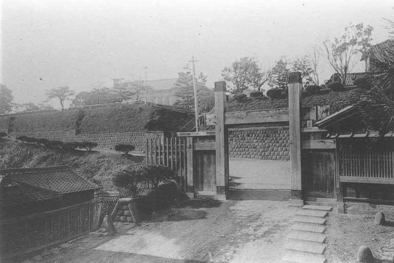 明治4年(1871年)3月慶應義塾を新錢座から三田に移した。旧島原藩の中屋敷黒門である。